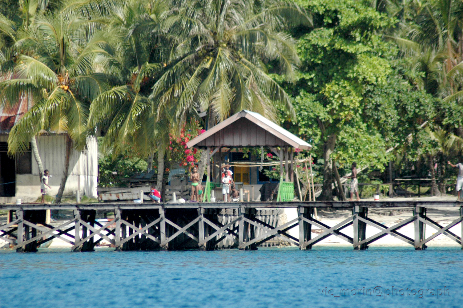 Passi Island